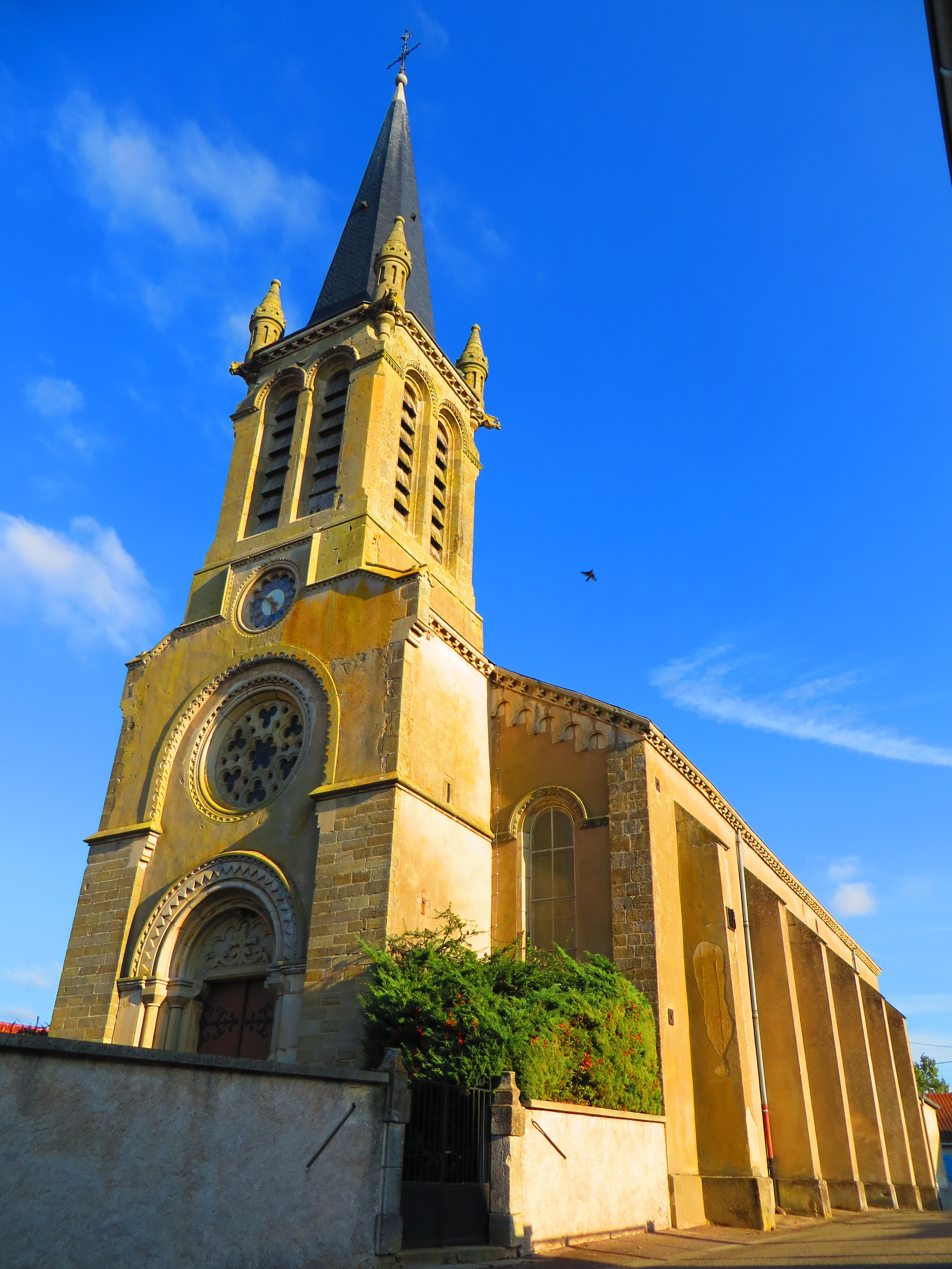 Hampont l'église Saint-Martin